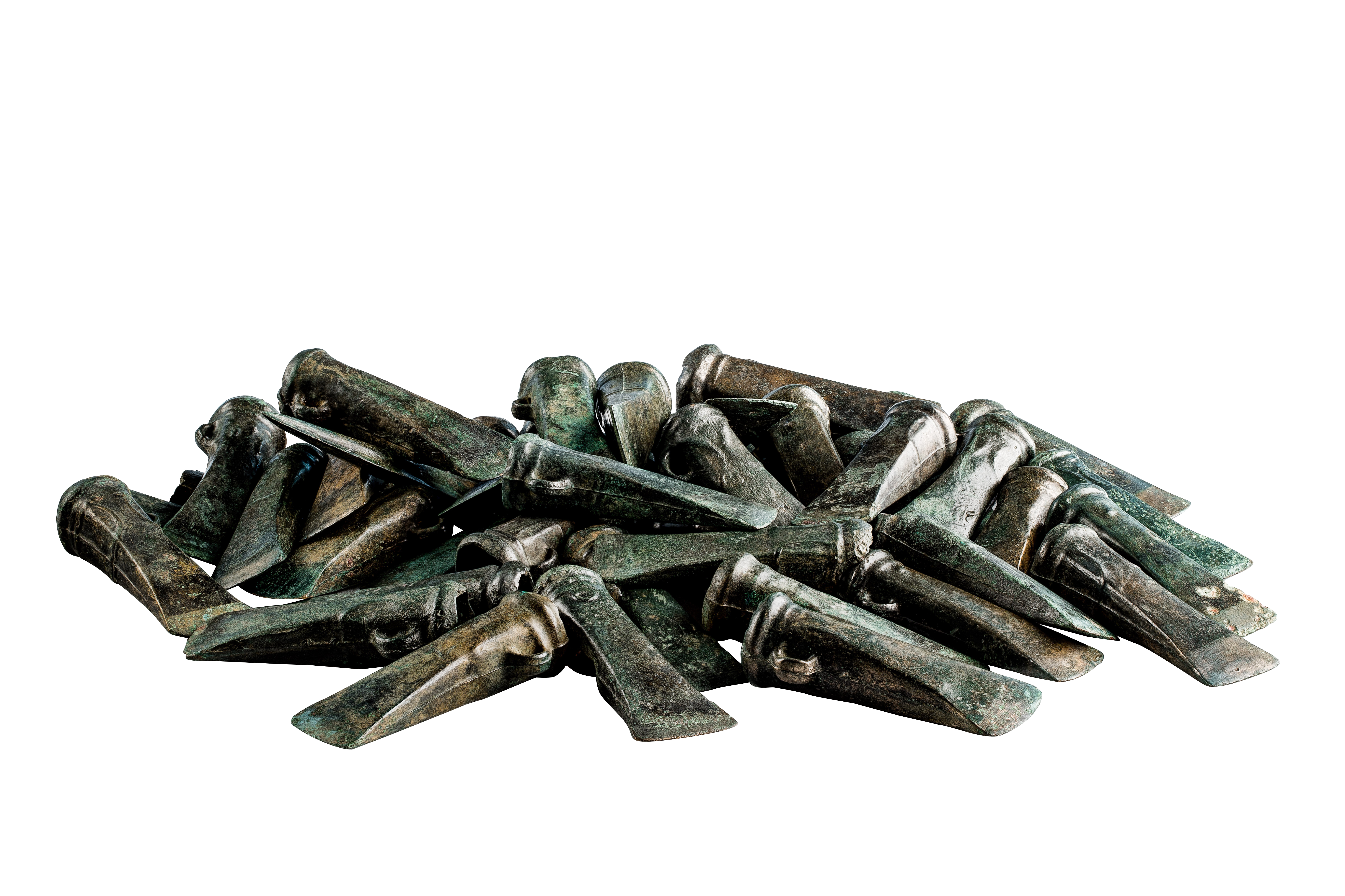 Het bronsdepot van Heppeneert, Rond 800 VC, vindplaats: Maaseik, Heppeneert, Wayerveld, collectie Gallo-Romeins Museum Tongeren, Bronsdepot Heppeneert